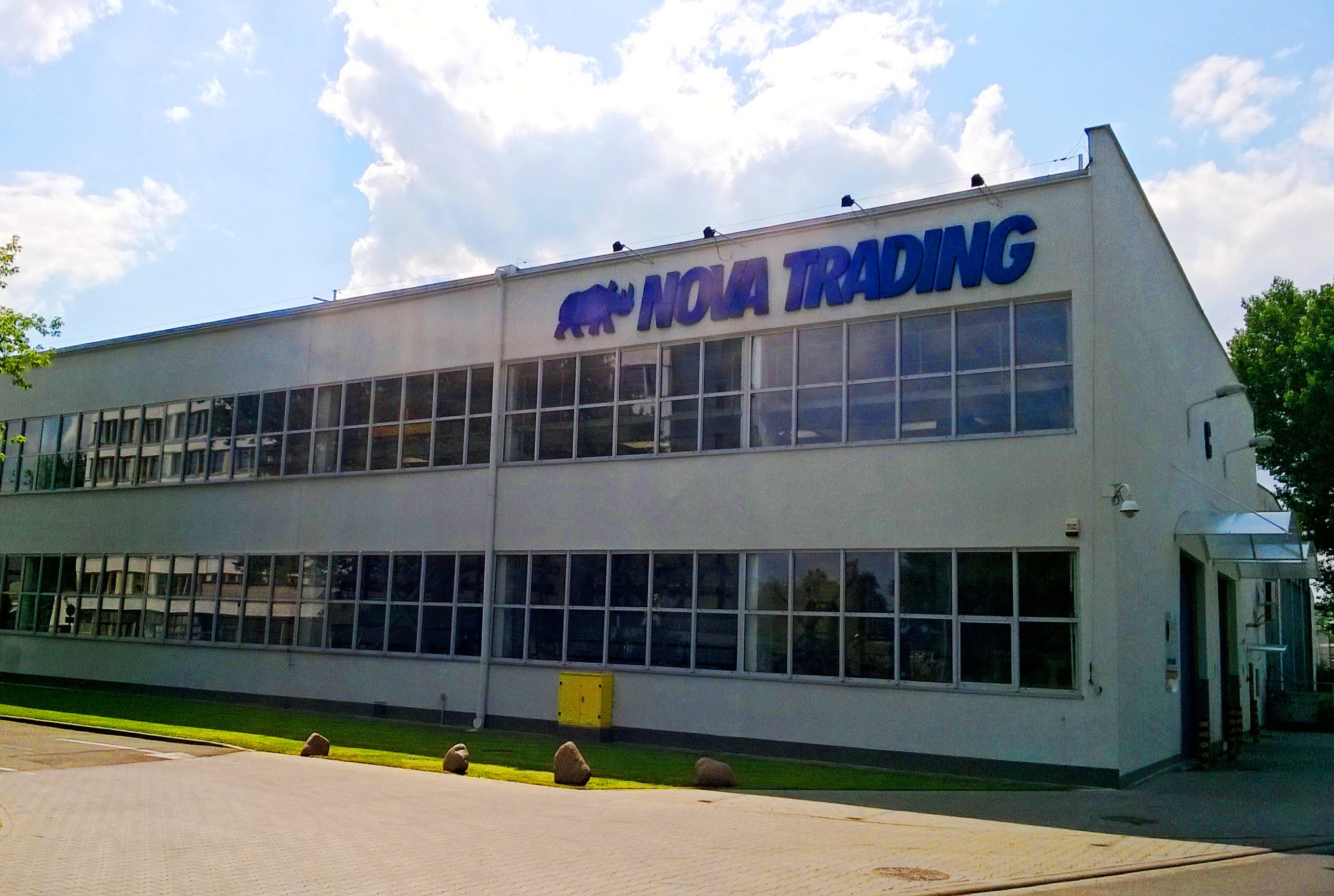 Nova Trading w Toruniu